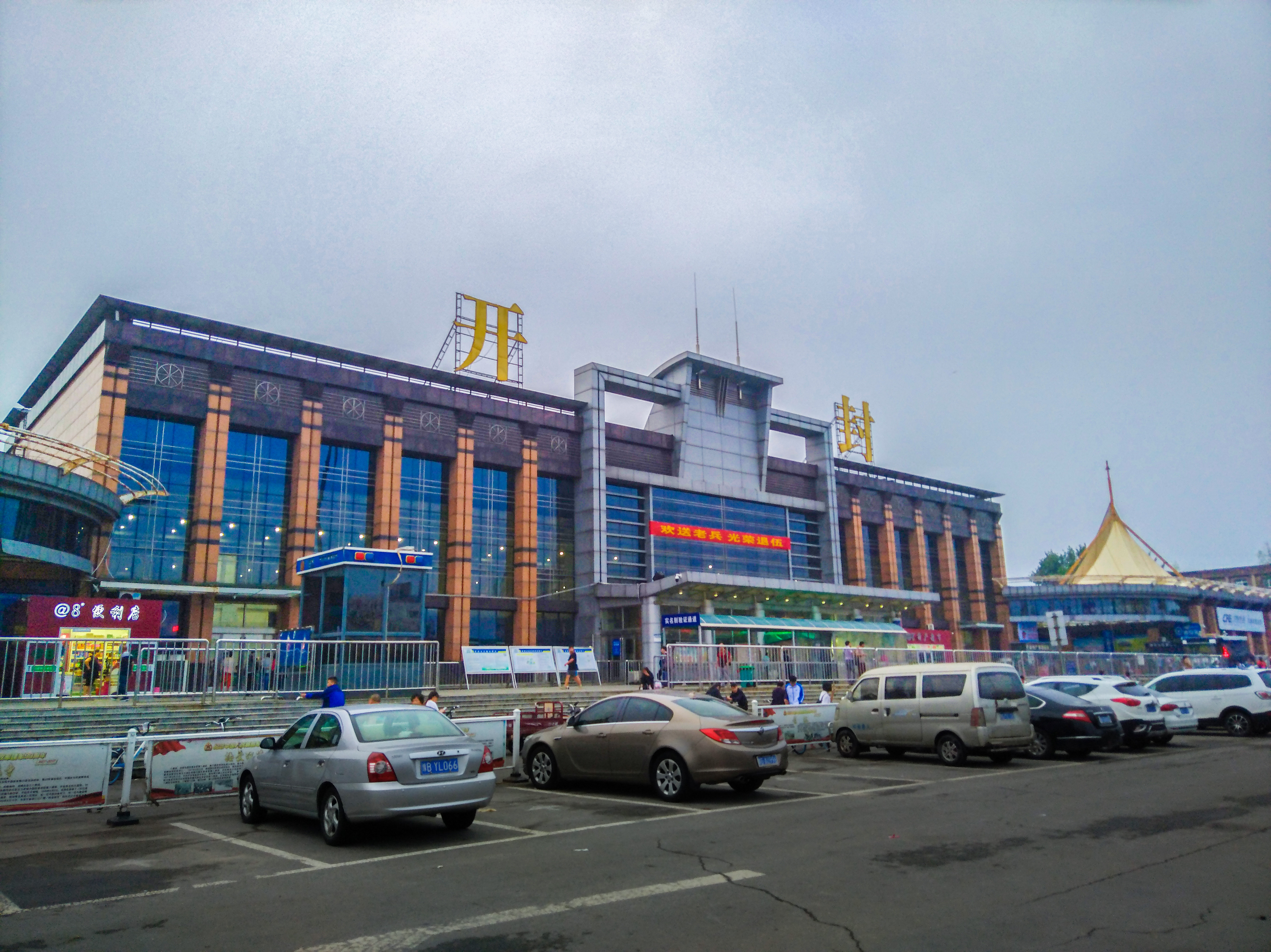 开封站